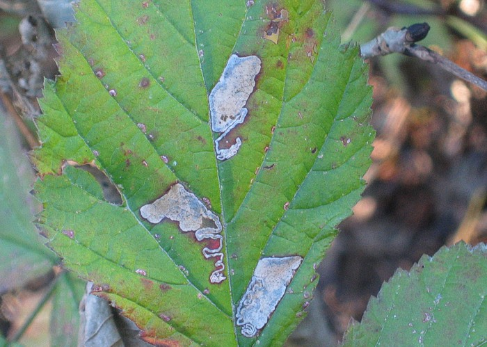 Minen von Ectoedemia rubivora